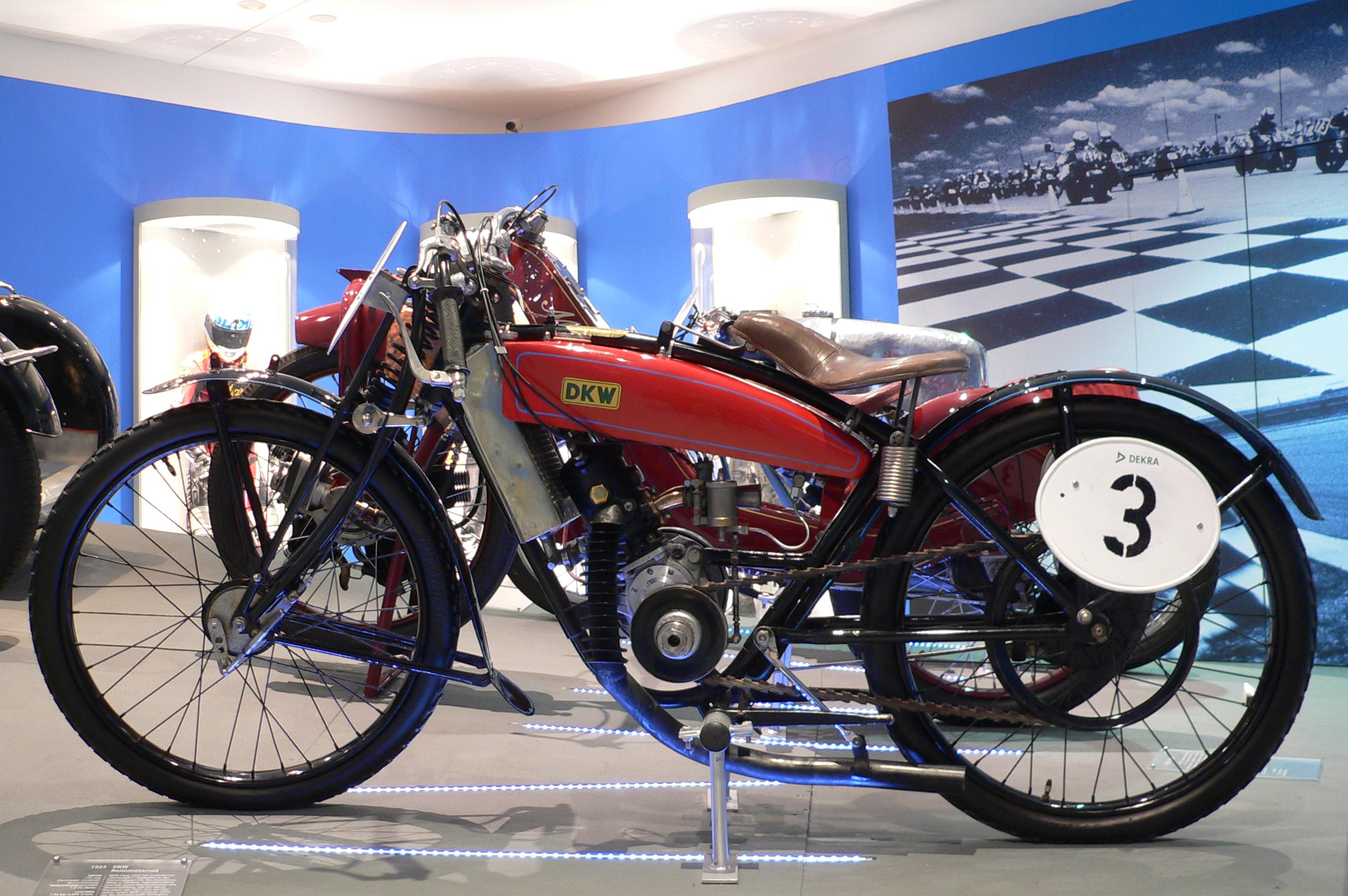 Racing Motorbike "DKW Renn-Motorrad" (1925) at the Deutsches Zweirad- und NSU-Museum (172 cm³, Einzylinder-Zweitakt-Motor, 7 PS bei 4.000 U/min., 95 km/h)